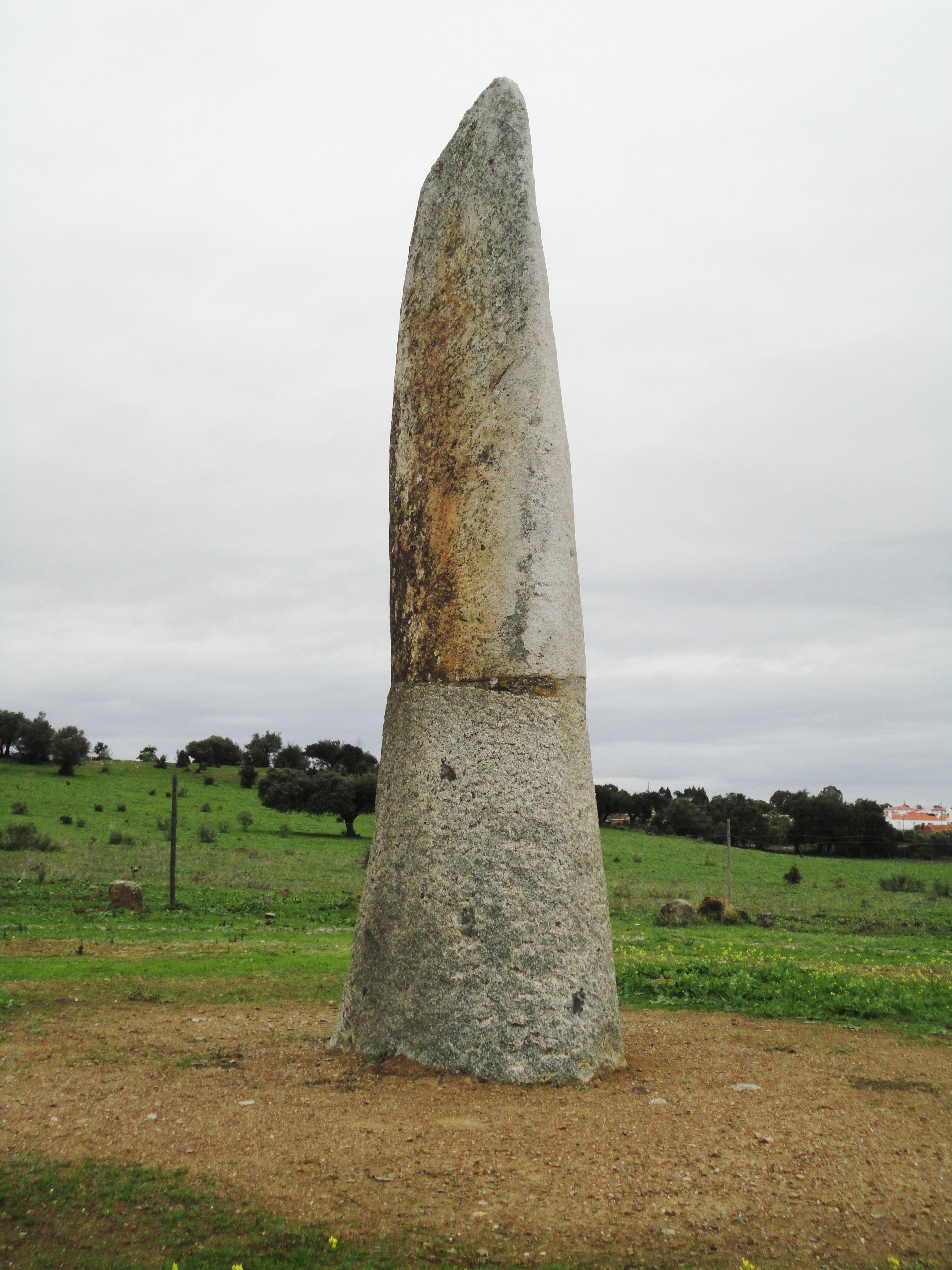 Menir da Belhoa/Bulhoa, Reguengos de Monsaraz